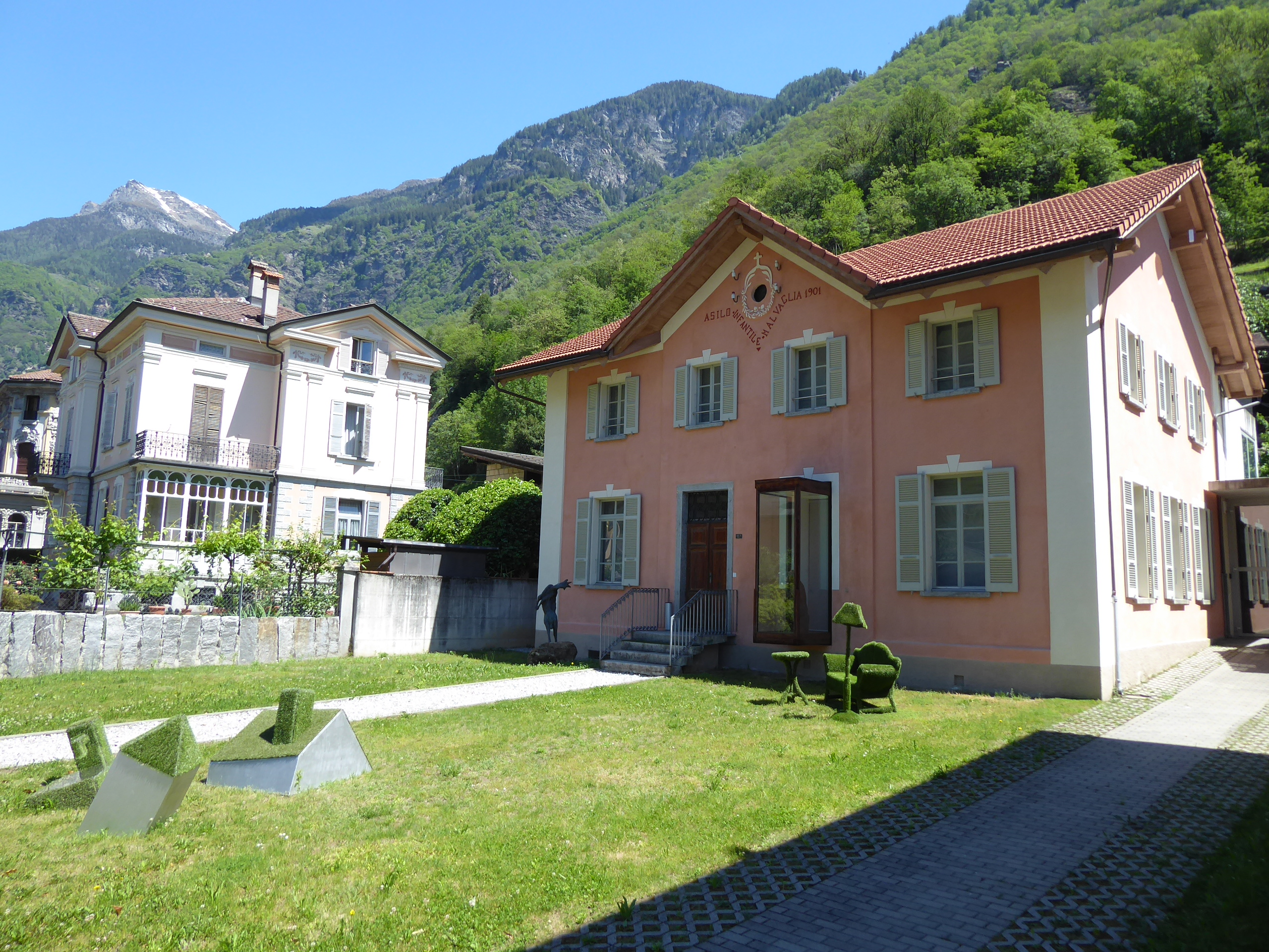 Das ehemalige Waisenhaus Asilo Infantile von 1901, links davon eine Rückkehrervilla.